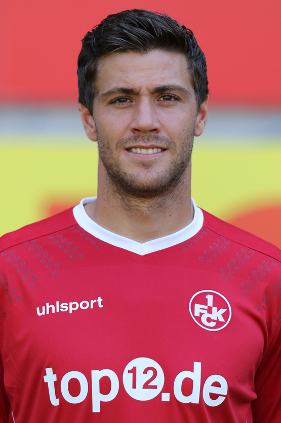 Benjamin Kessel